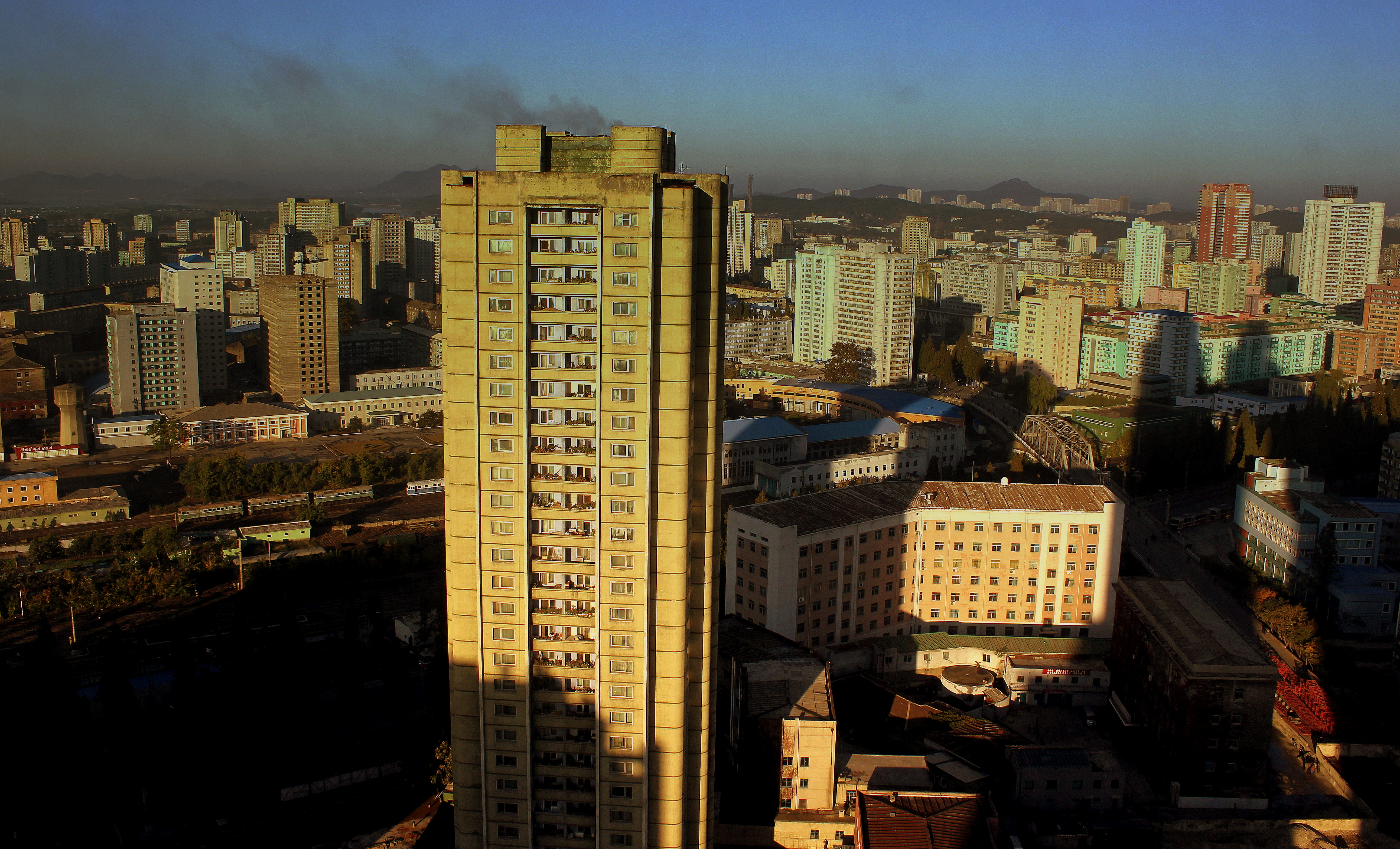 PYONGYANG SUNNY MORNING TAKEN FROM THE 34TH FLOOR OF THE KORYO HOTEL PYONGYANG CITY DPRK NORTH KOREA OCT 2012